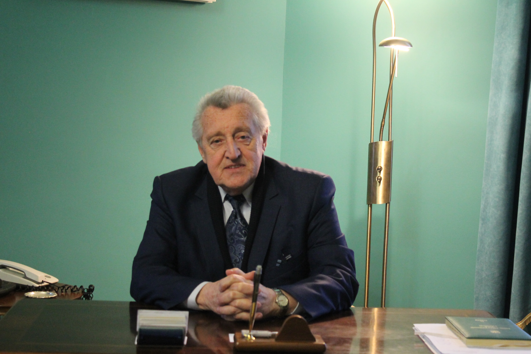 Лукашев Володимир Анатолійович,художній керівник Національної філармонії України (робочий кабінет, 2016)